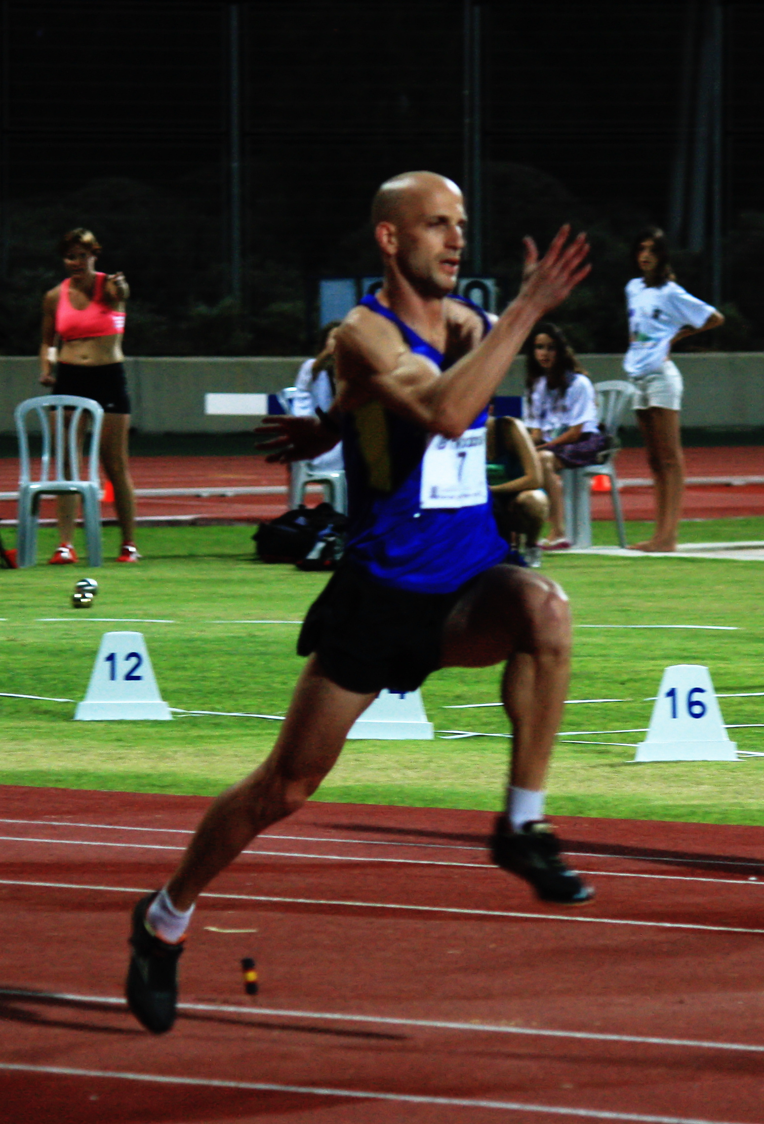 יוחאי הלוי. תחרות הלילה באצטדיון האתלטיקה ראשון לציון, 29 ביולי 2013.